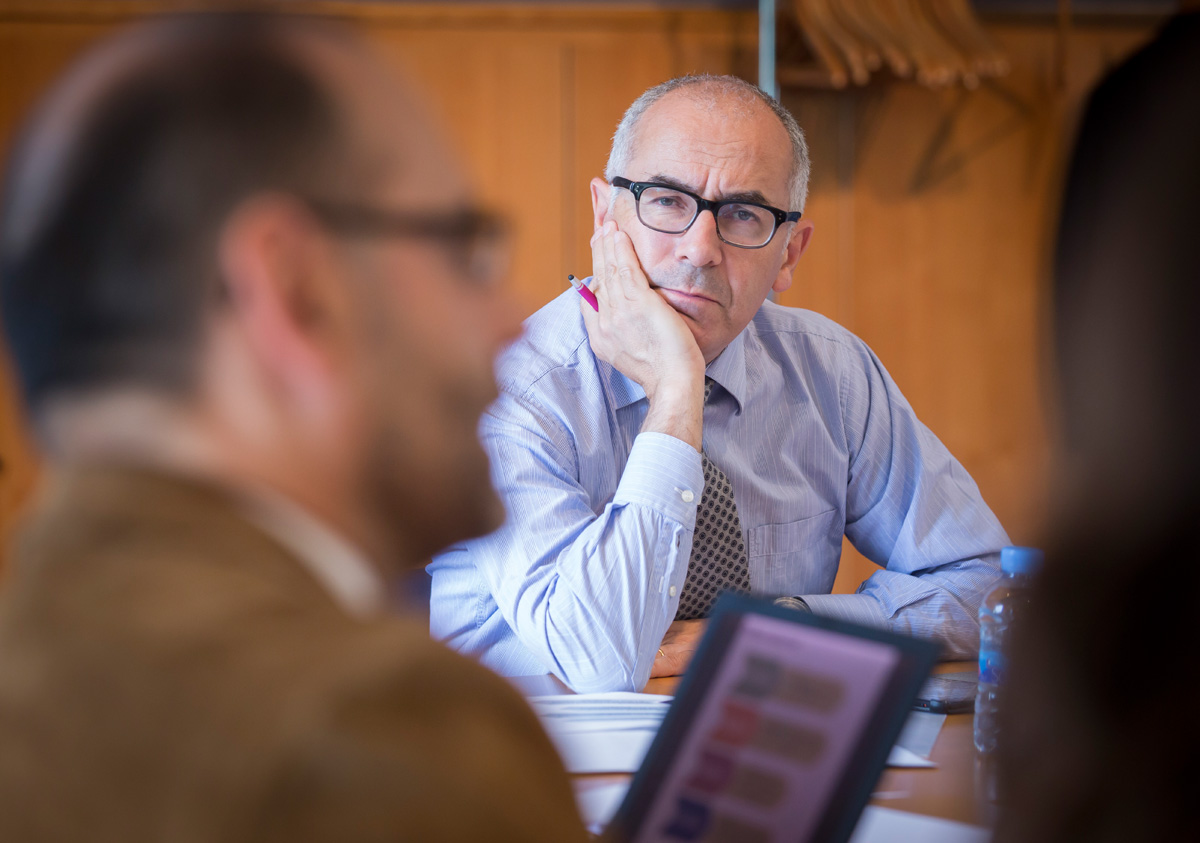 Comité de Pilotaje EHUBAQ 2014